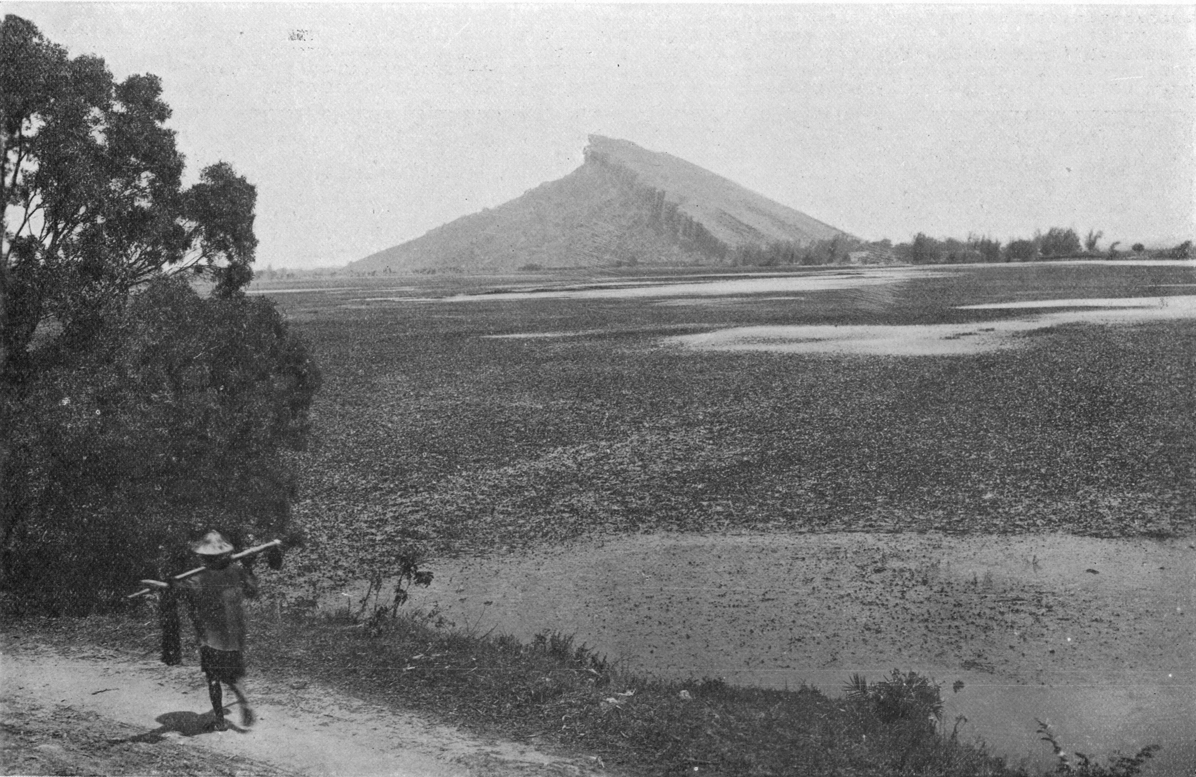 中文（台灣）: 作者：勝山吉作。半屏山。典藏者：中央研究院數位物件典藏者：中央研究院數位文化中心。公眾領域標章（Public Domain Mark）。發佈於《開放博物館》 從北方搭汽車越過嘉義、臺南，右手方的山地、丘陵會越來越少，但在快接近高雄時右方車窗突然看見一塊板狀的岩石，而後進入高雄車站的地方可看見初次見到的山。